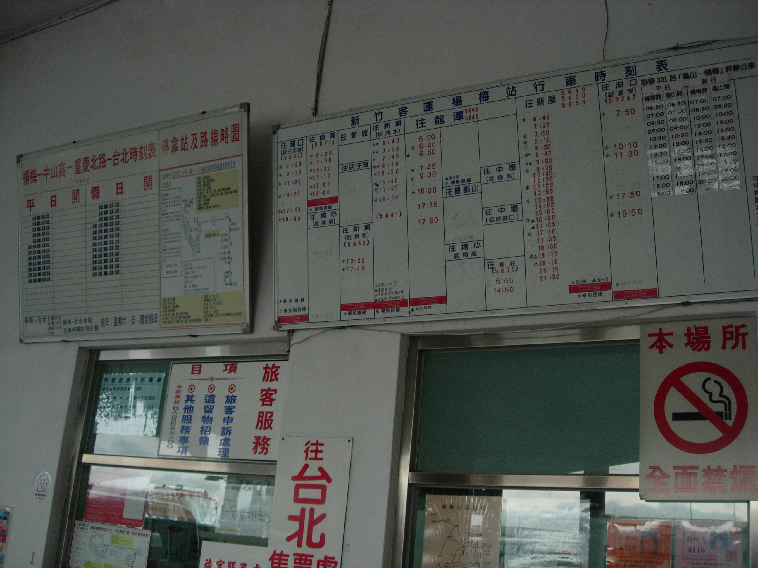 中文（台灣）: 新竹客運楊梅站時刻表